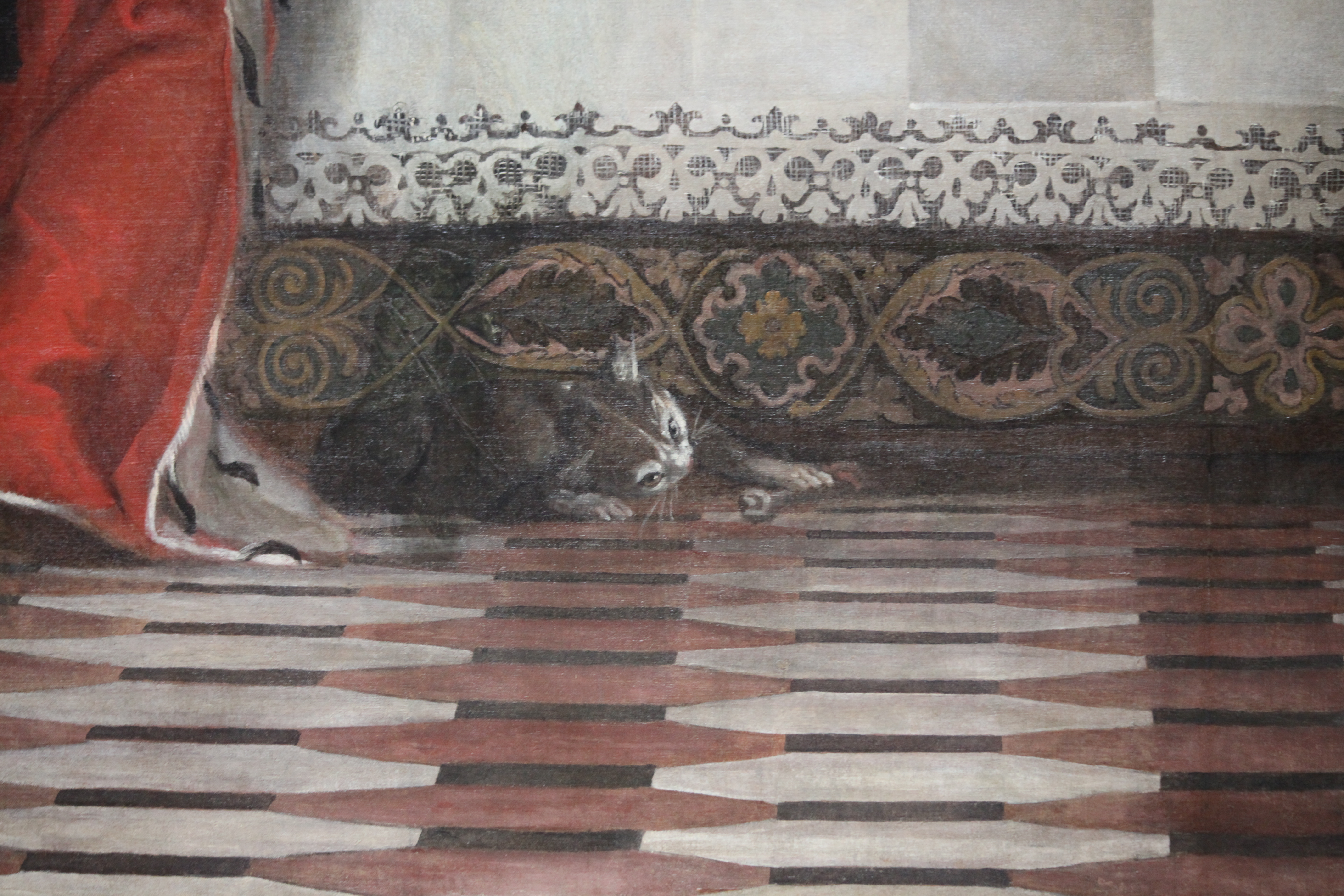 Gallerie dell'Accademia - MIBAC This is a photo of a monument which is part of cultural heritage of Italy.